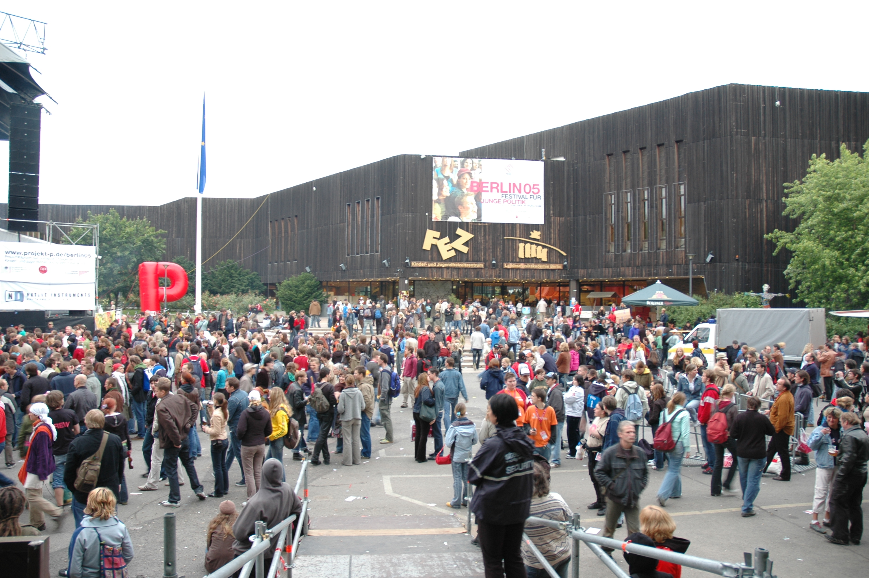 Hauptgebäude des FEZ zur Veranstaltung Berlin 05